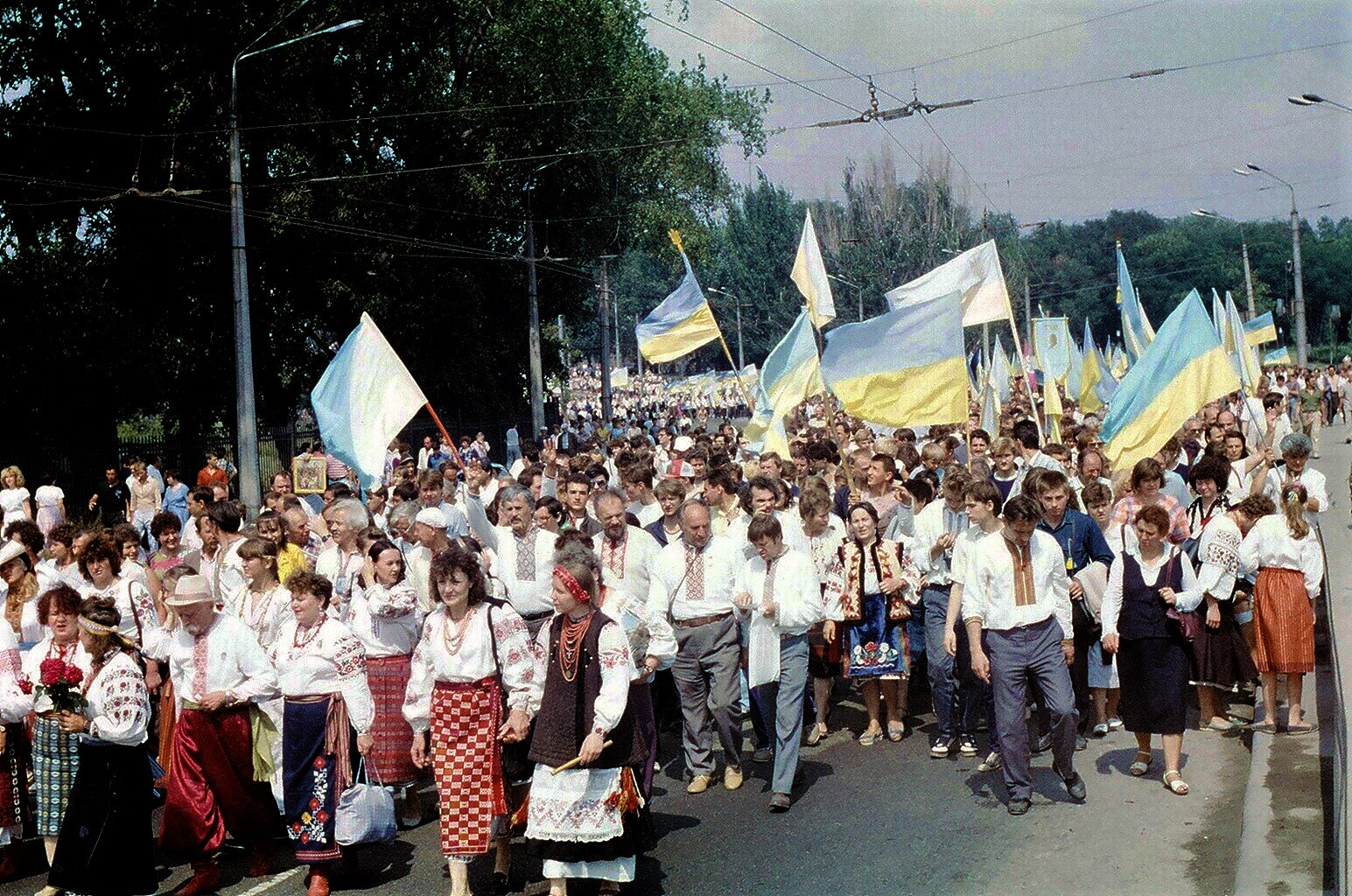 Хід м. Запоріжжя. 500 років українському козацтву. 1990.: фото